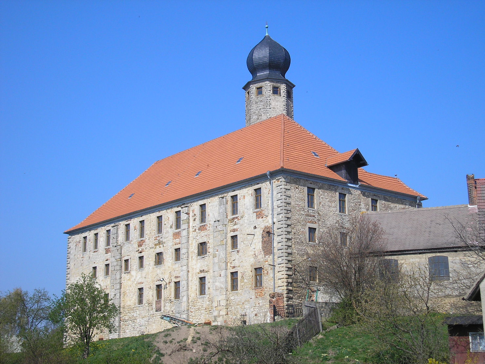 Das ehemalige Rentamt von Frauenprießnitz (Thüringen).